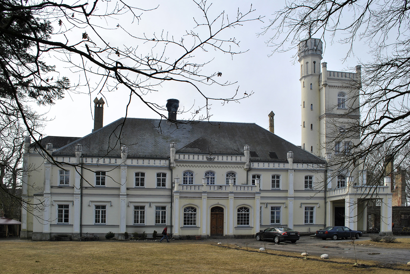 Widok na pałac od strony jeziora